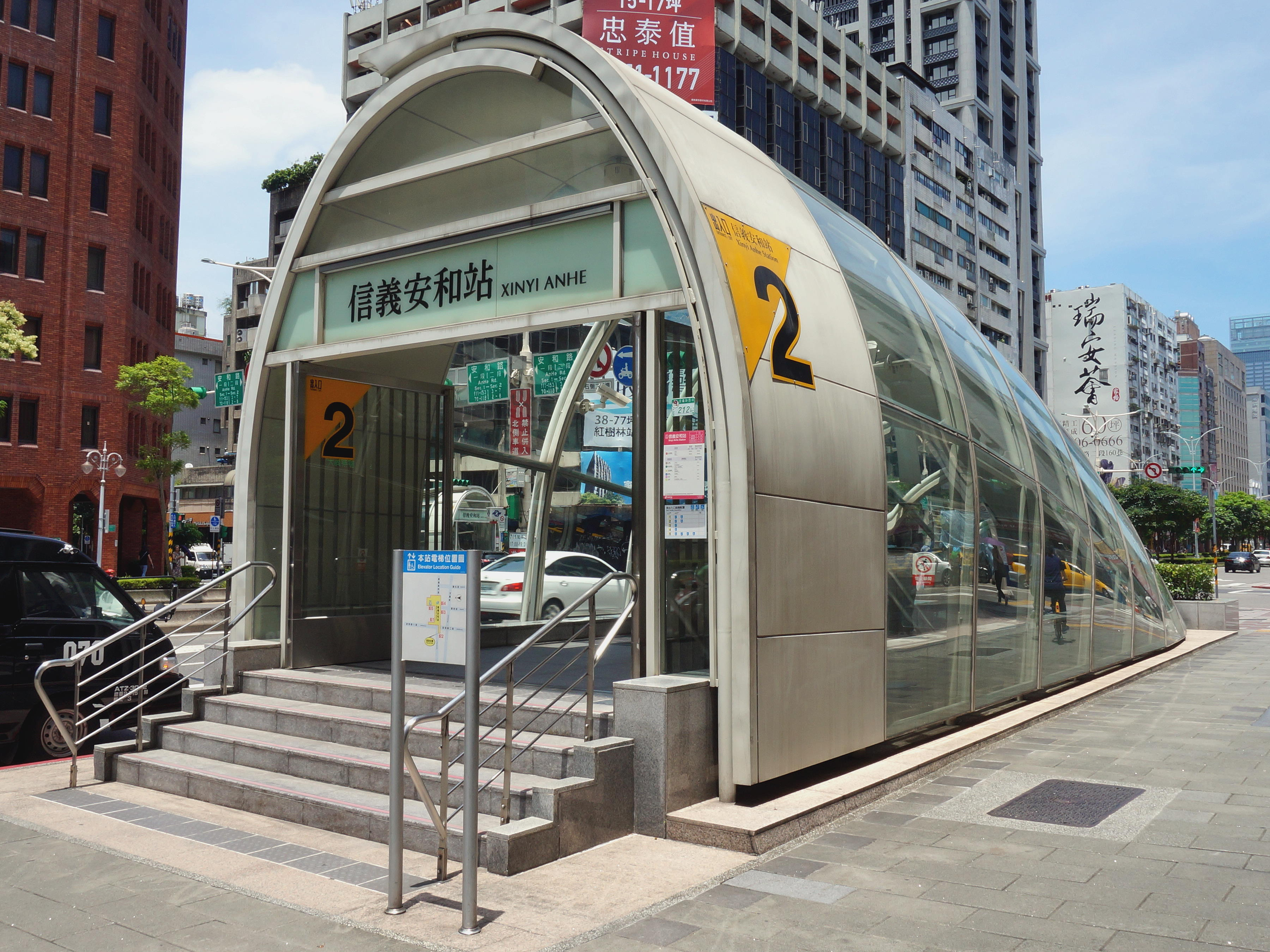 台北捷運信義安和站2號出口。